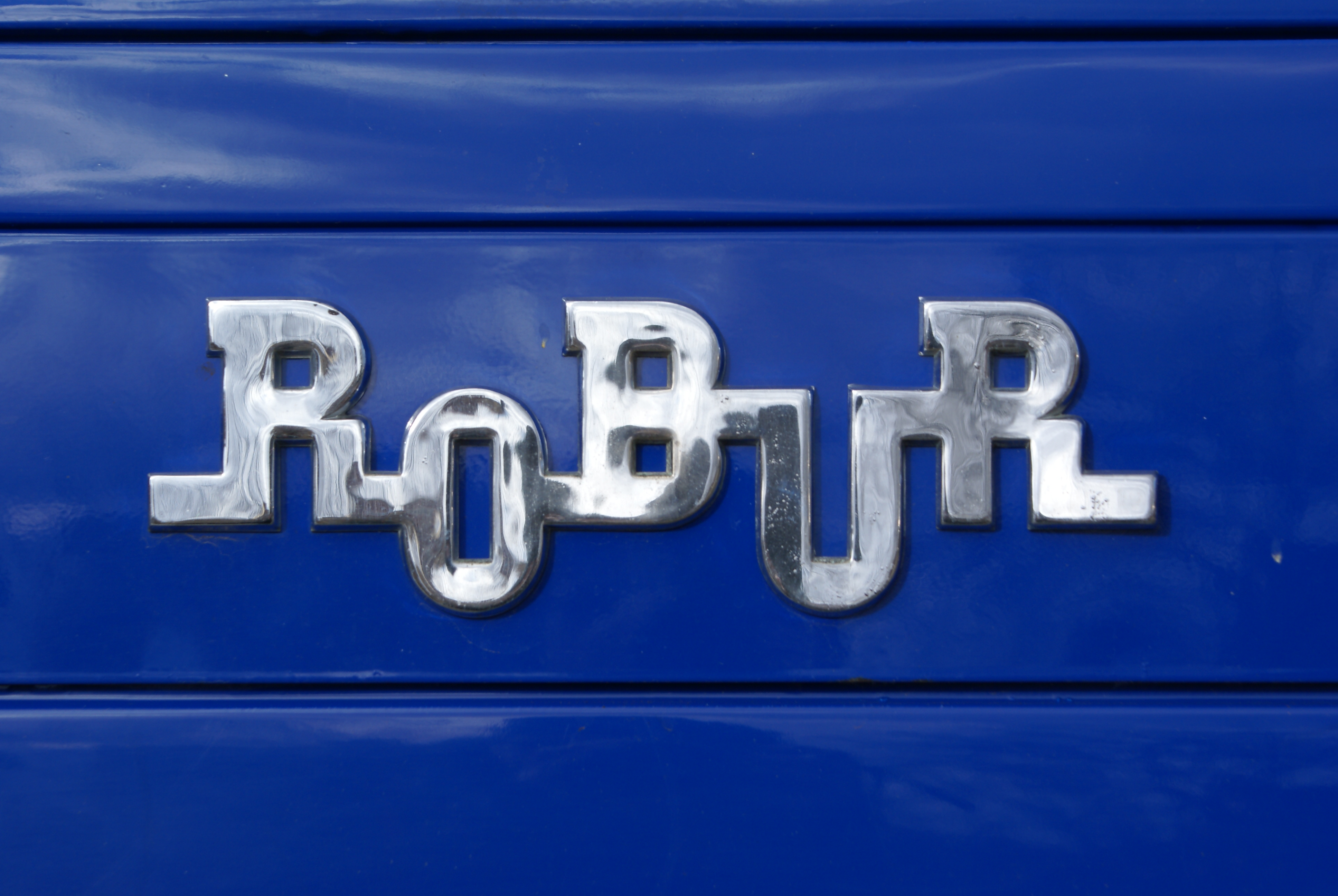 Robur Markenzeichen - vermutlich Robur LO 2501 (Bus)